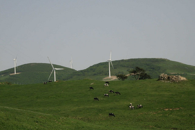 대관령1